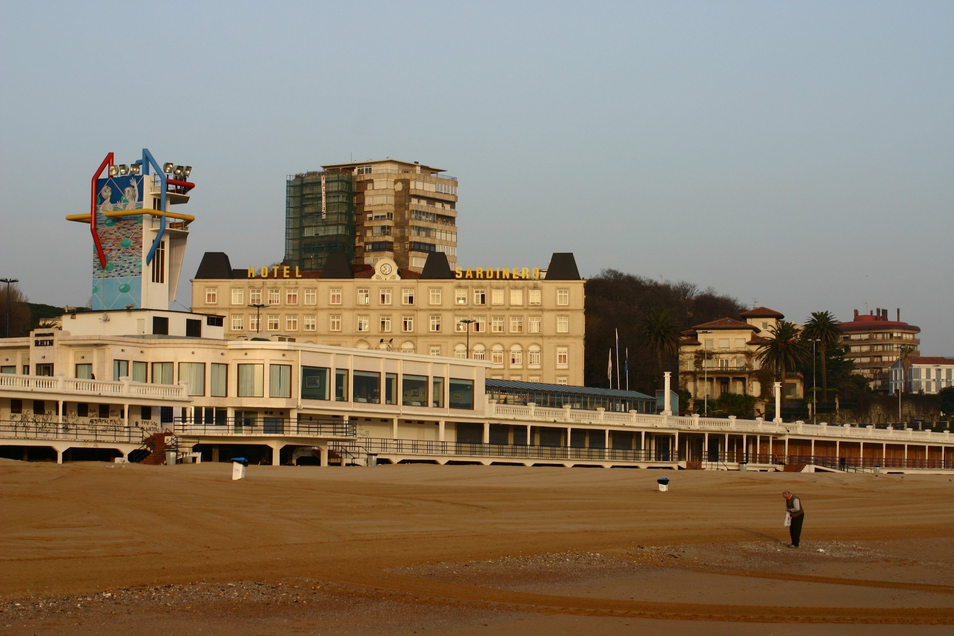 Playa de El Sardinero